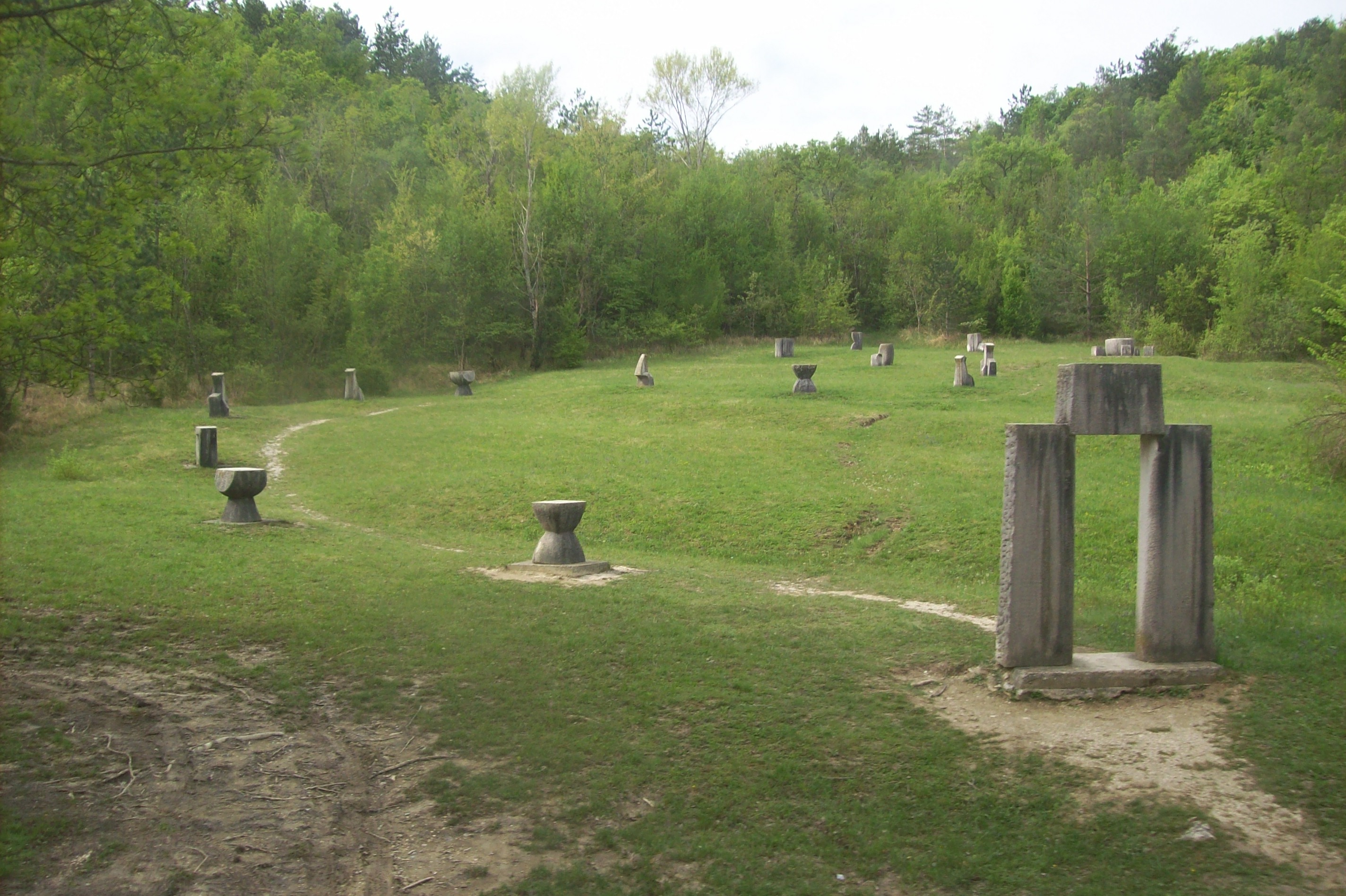 Uspon Istarskog razvoda, Aleja glagoljaša, Istra, Hrvatska